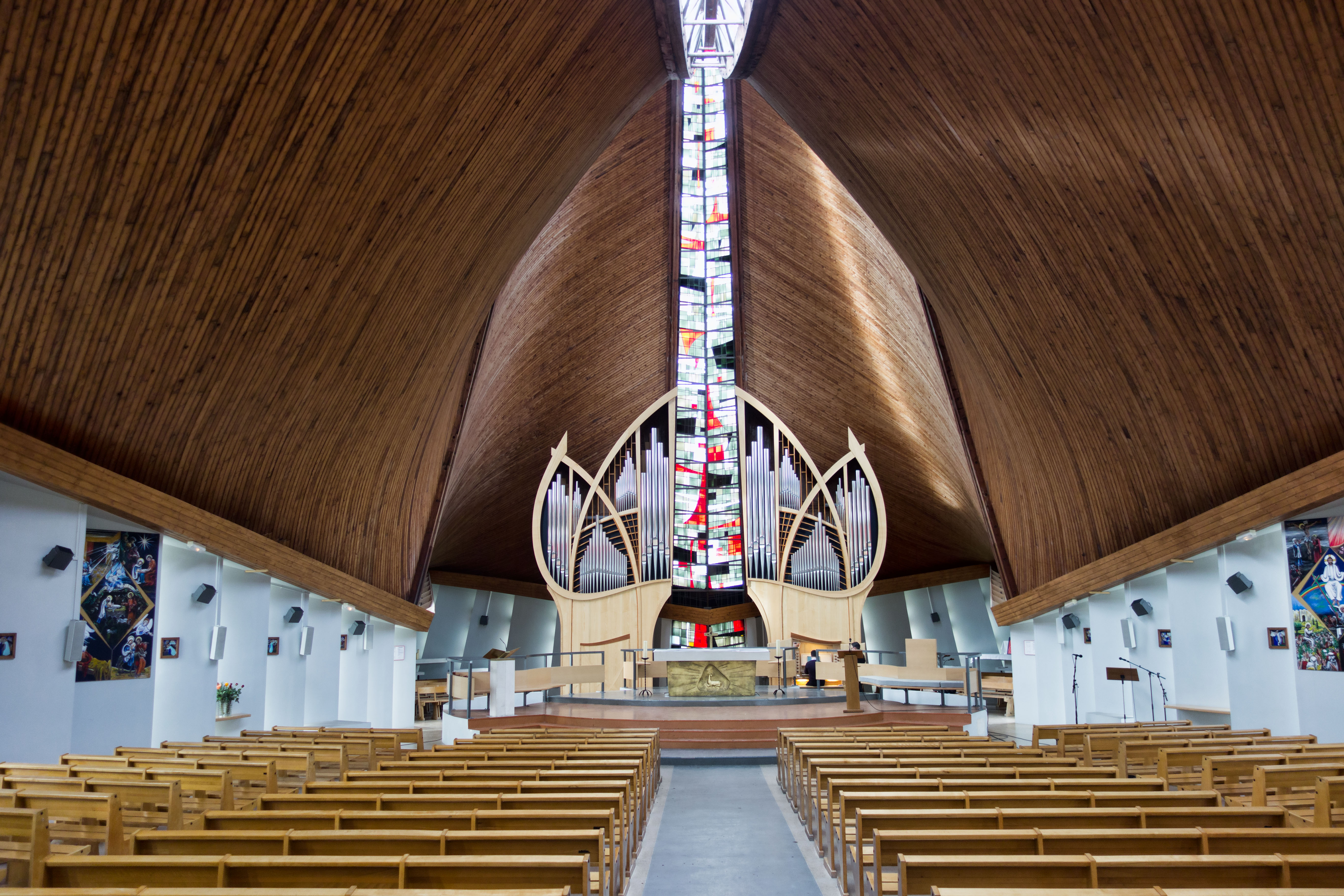 Intérieur de l'église St Thibault